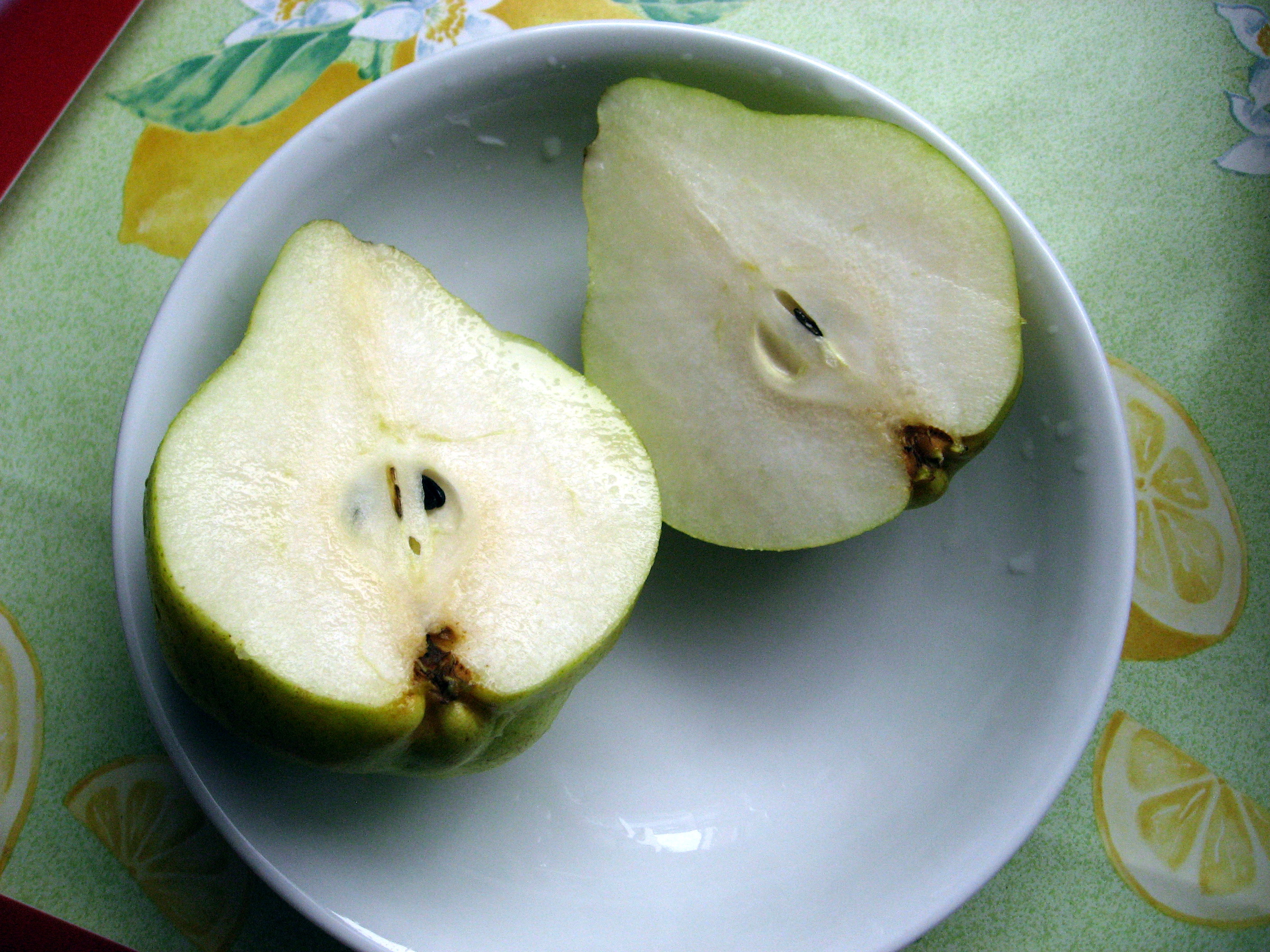 rozkrojená hruška